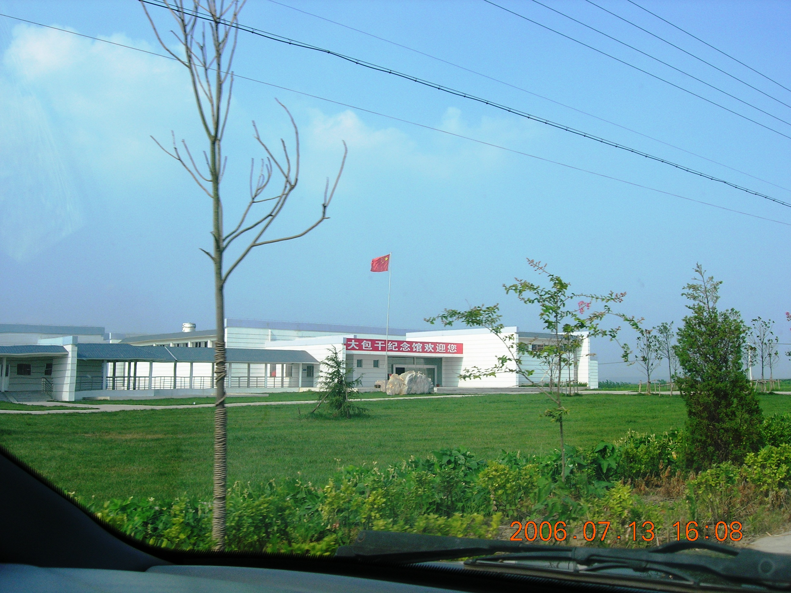 凤阳县－小岗村景色 大包干纪念馆